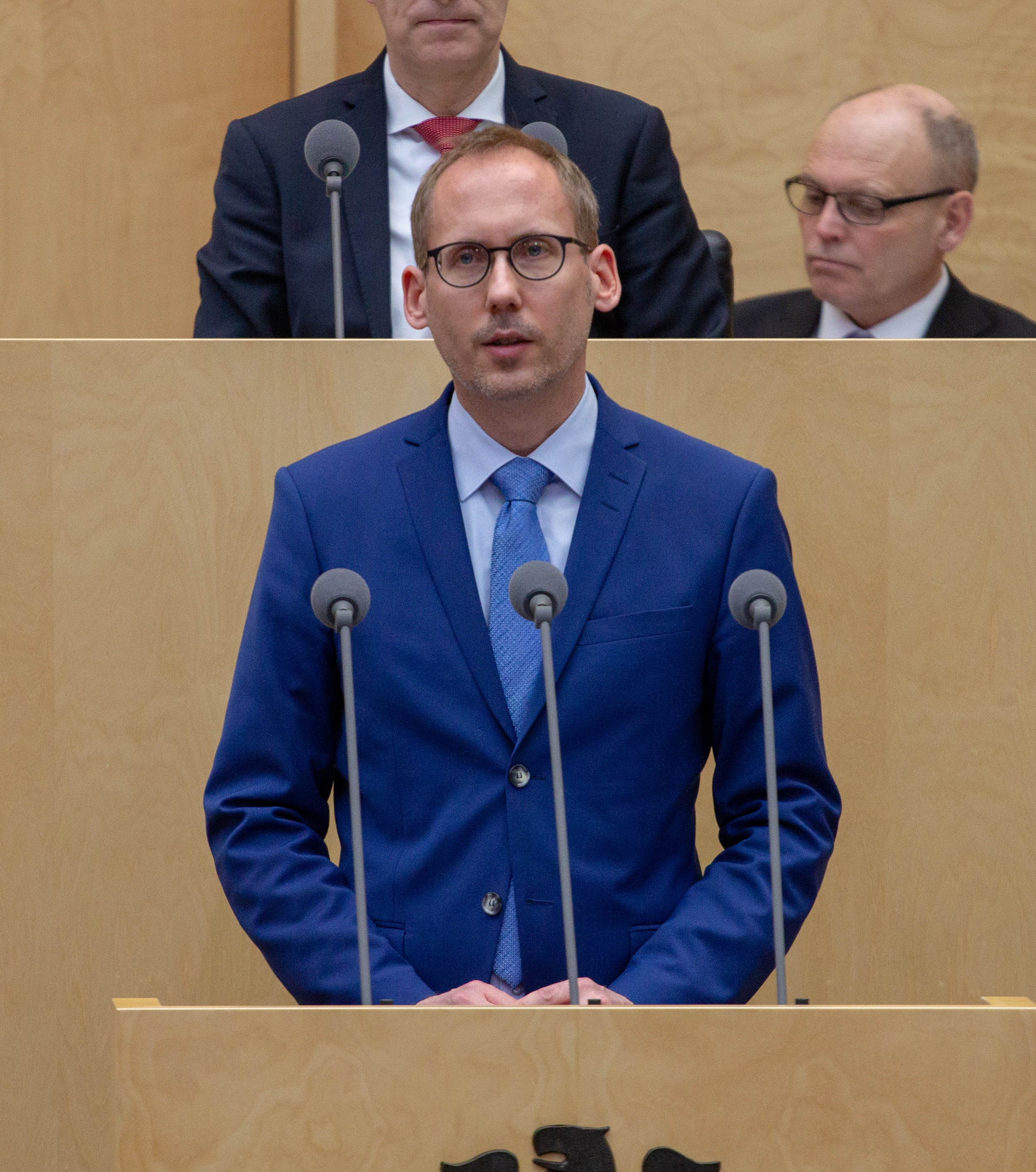 Plenarsitzung des Bundesrates am 12. April 2019 in Berlin.